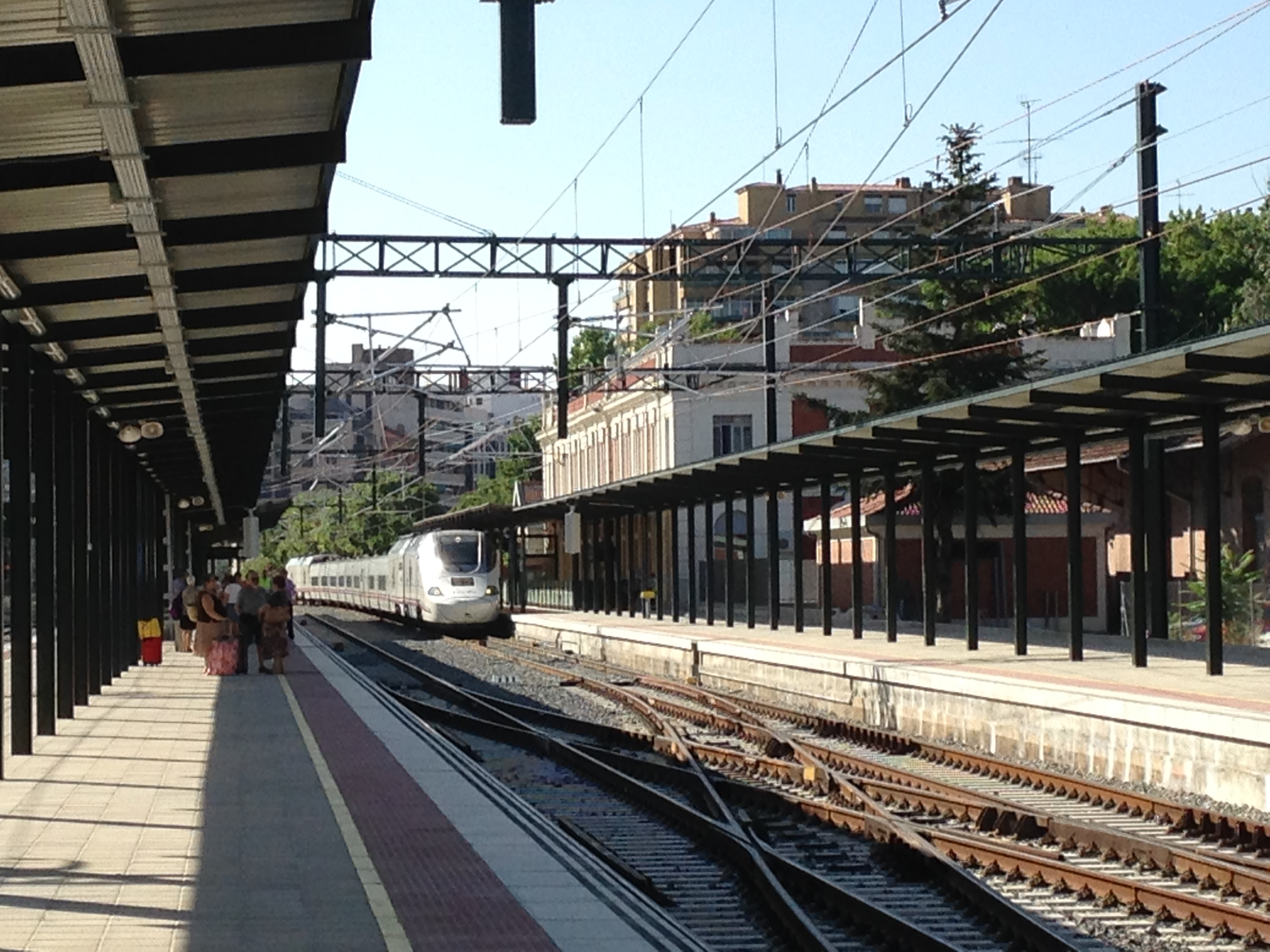 Andenes Alta Velocidad de la estación de Palencia